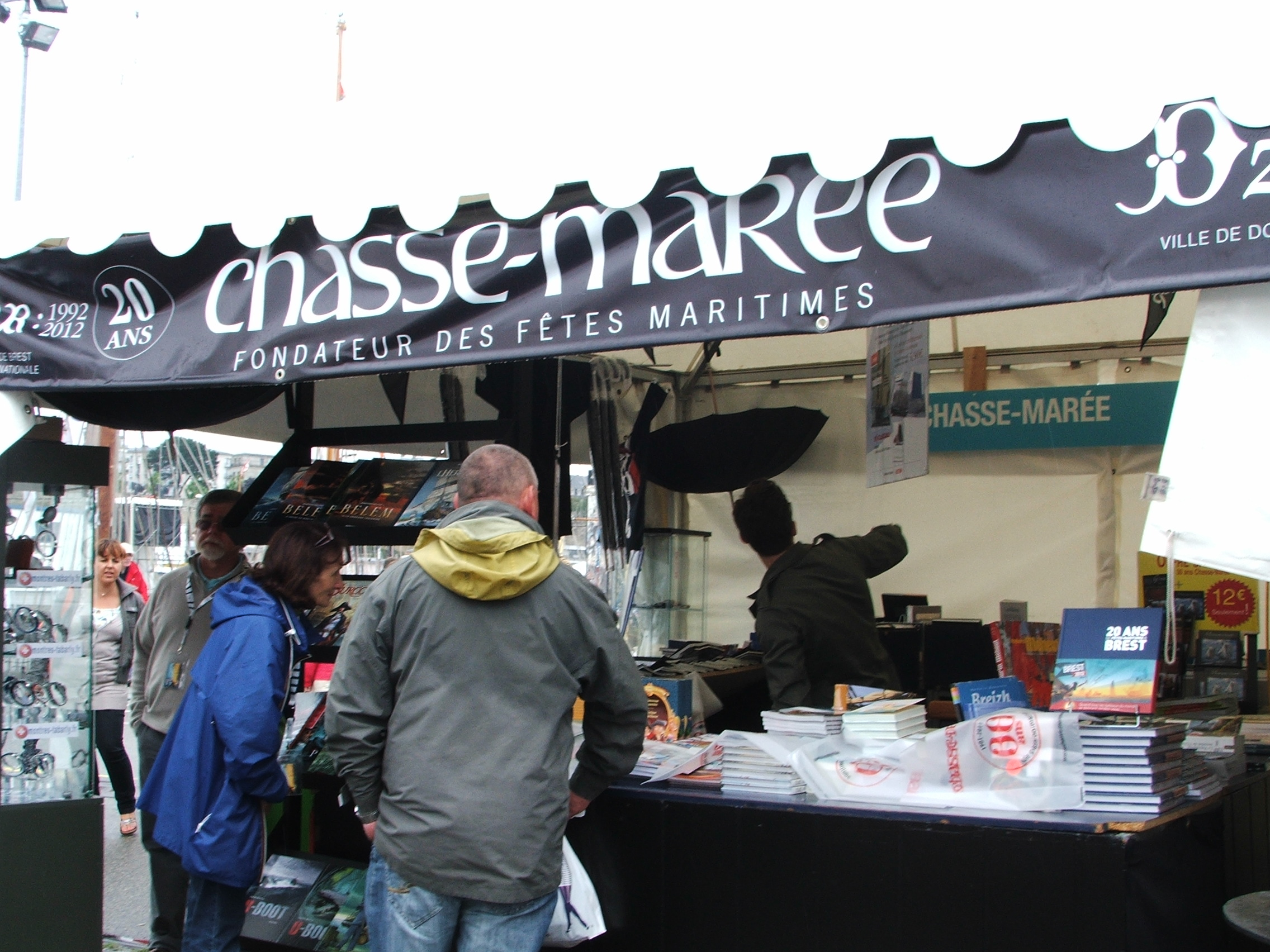 stand du chasse marée quai malbert